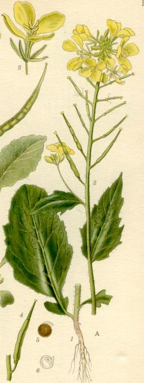 Augalo požymiai